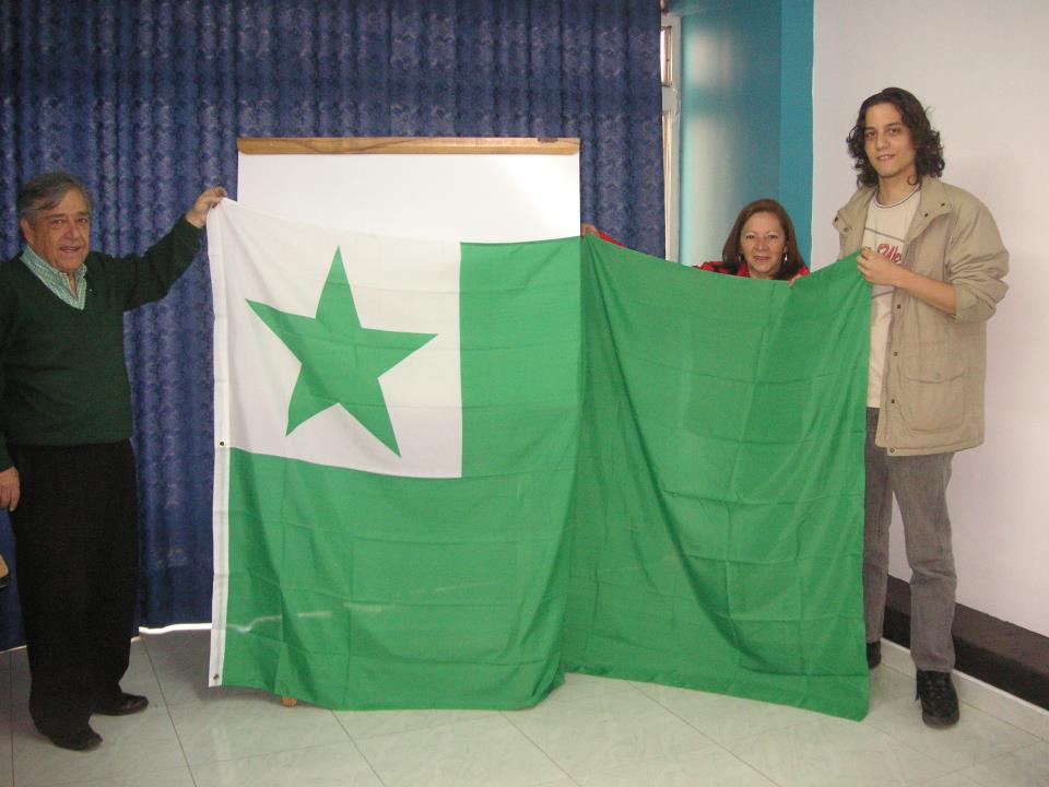 De Izquierda a Derecha: Luis Jorge Santos (Presidente de la Liga Colombiana de Esperanto), Estela (Secretaria) y Juan Sebastian Quintero Santacruz